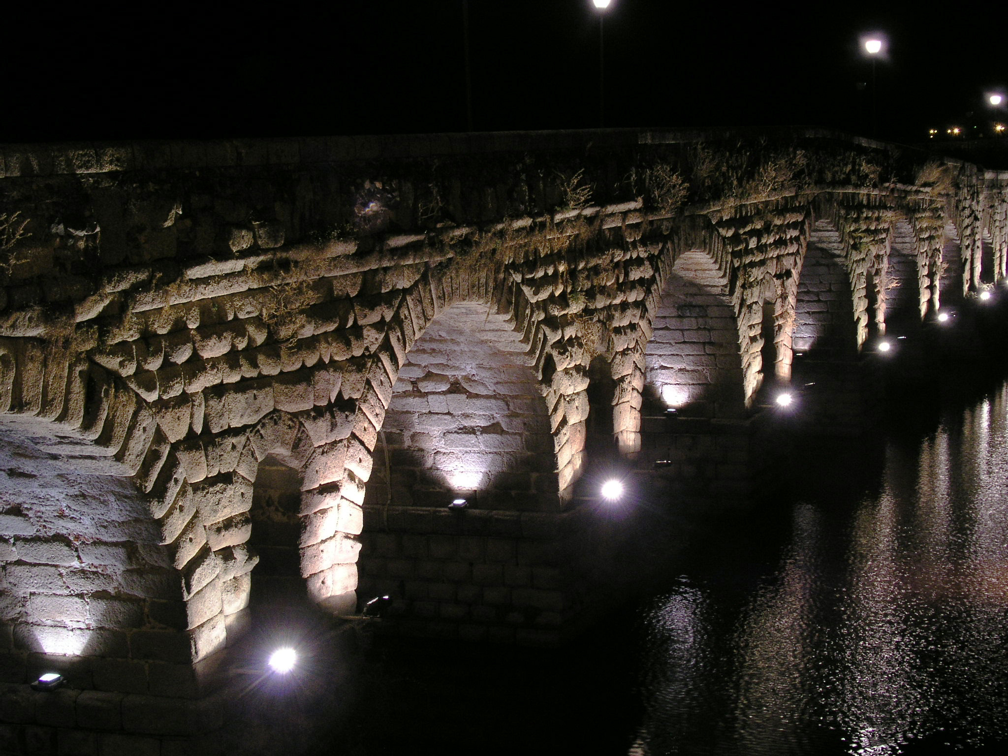 Mérida Puente Romano